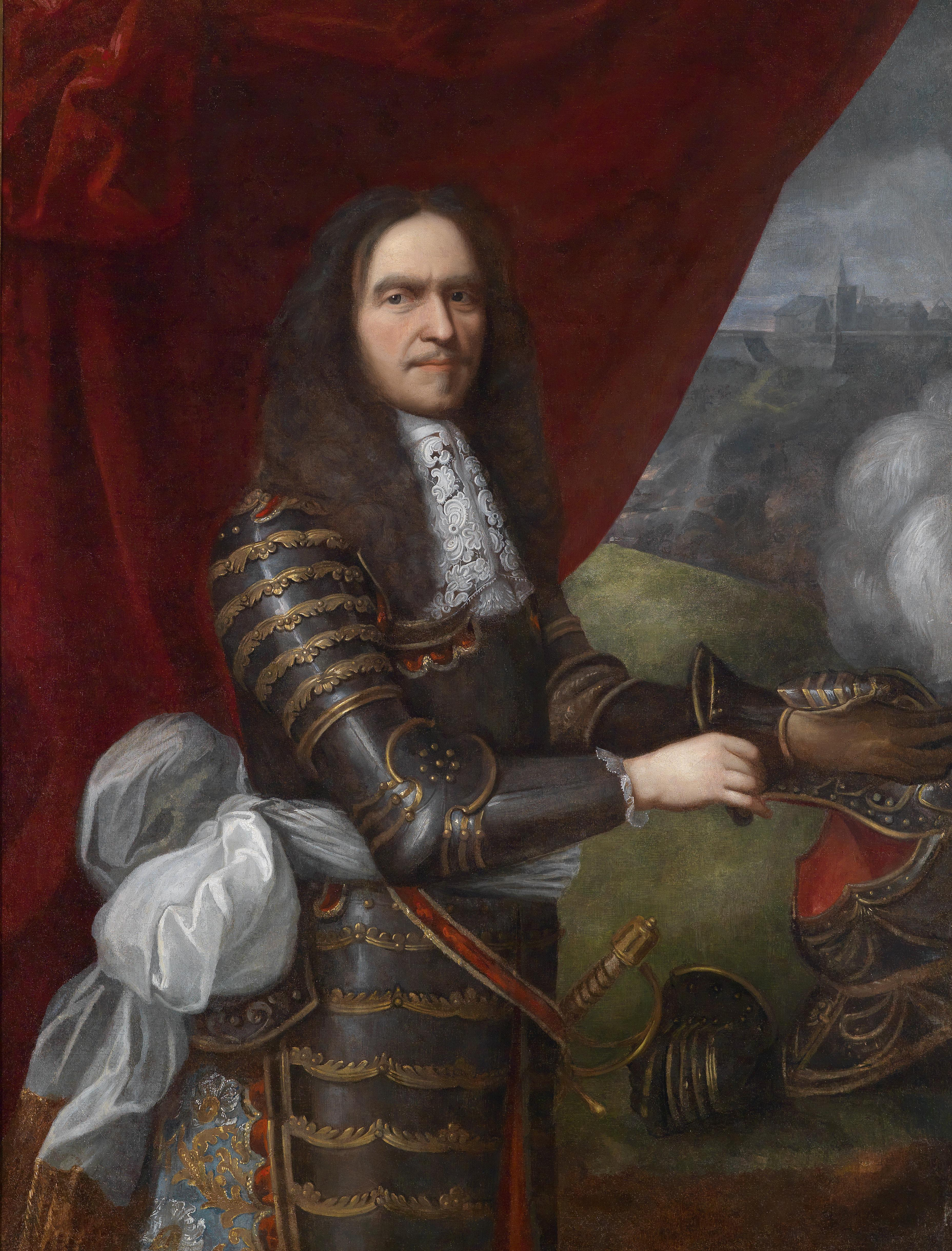 Bildnis des Henri de La Tour d'Auvergne, Vicomte de Turenne (1611-1675), Maréchal de France, Öl auf Leinwand, 126 x 95 cm